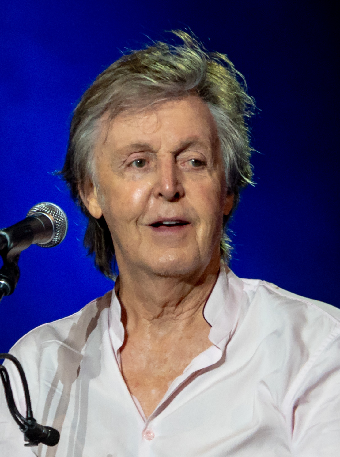 ACL18051018-169